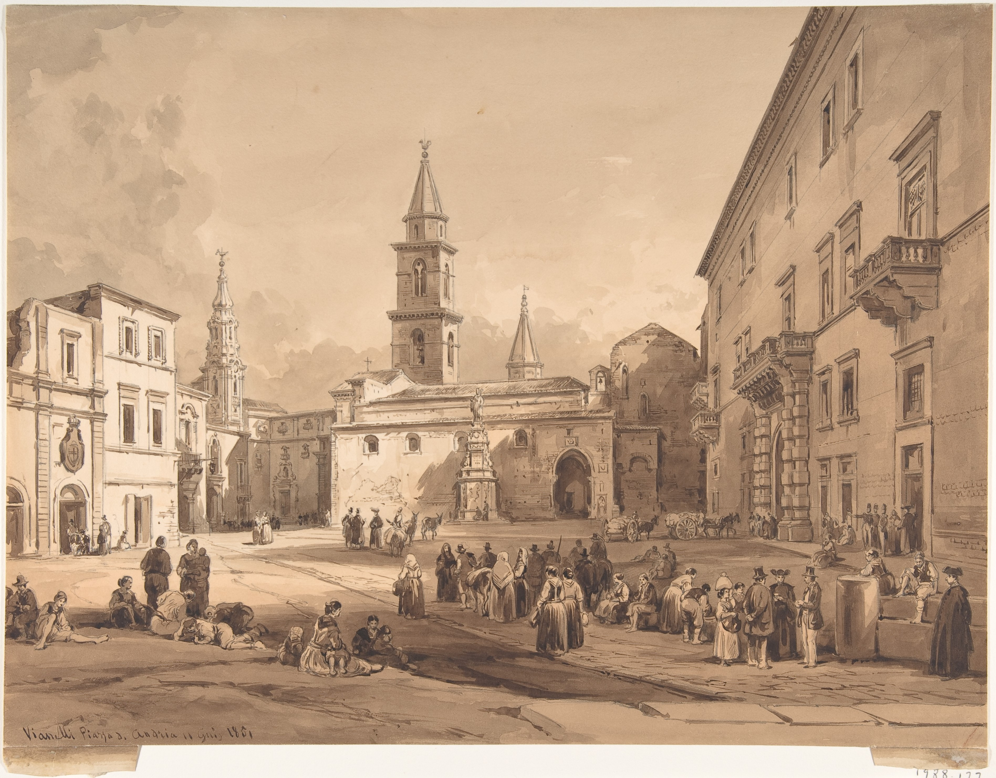 Piazza La Corte ad Andria nel 1851